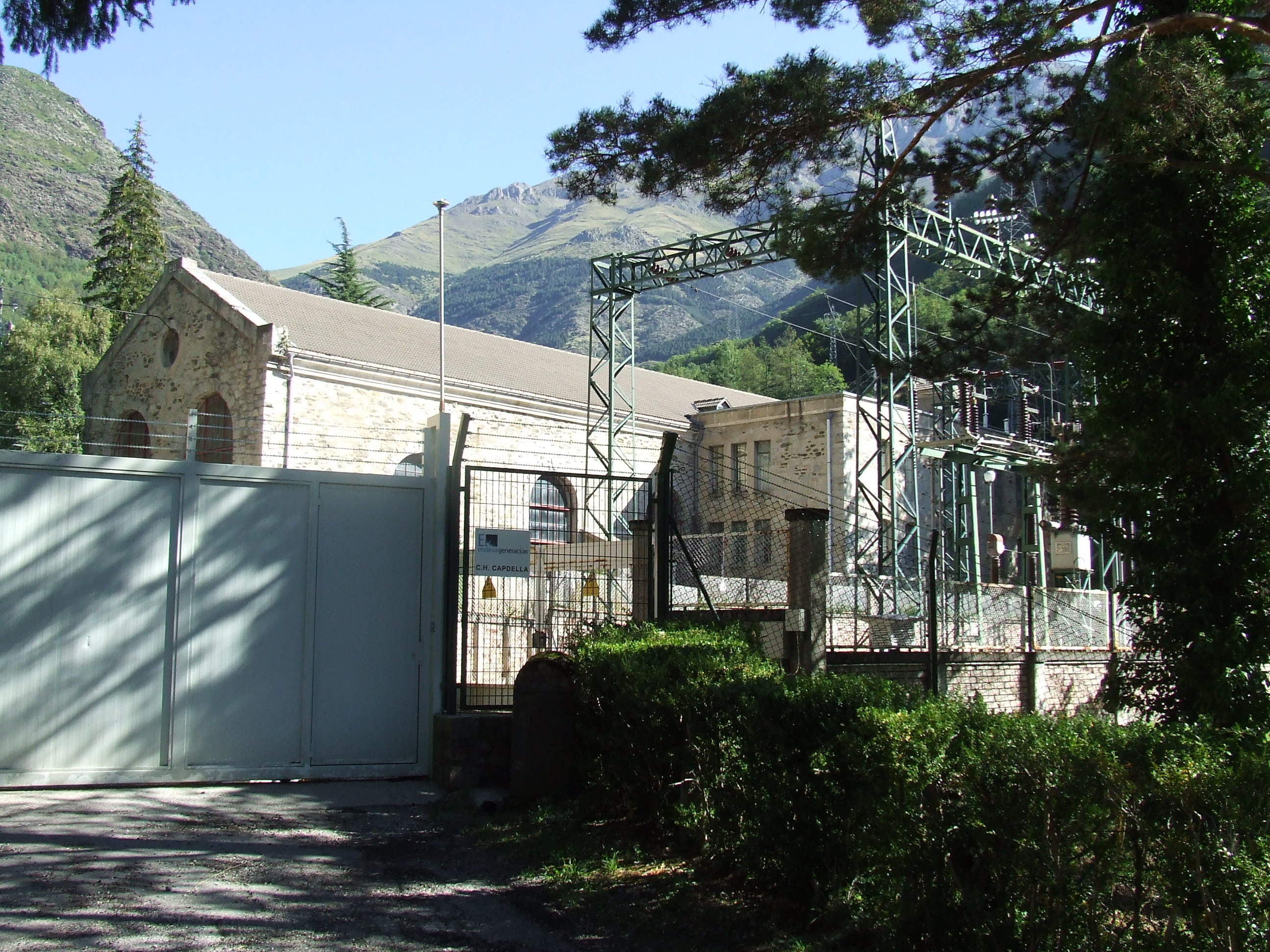 La Central de Cabdella (la Torre de Cabdella, Pallars Jussà)